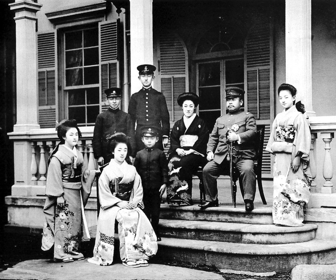 久邇宮邦彦王一家（於 久邇宮邸） 前列左から、信子女王、香淳皇后 中列左から、邦久王、邦英王 後列左から、朝融王、俔子妃、久邇宮邦彦王、智子女王